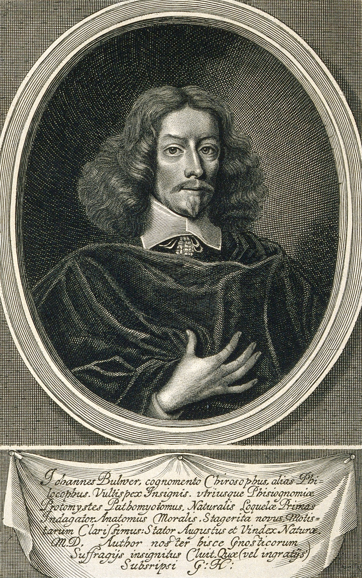 Gravure représentant Bulwer par Faithorne, réalisée vers 1653 pour le livre Anthropometamorphosis.